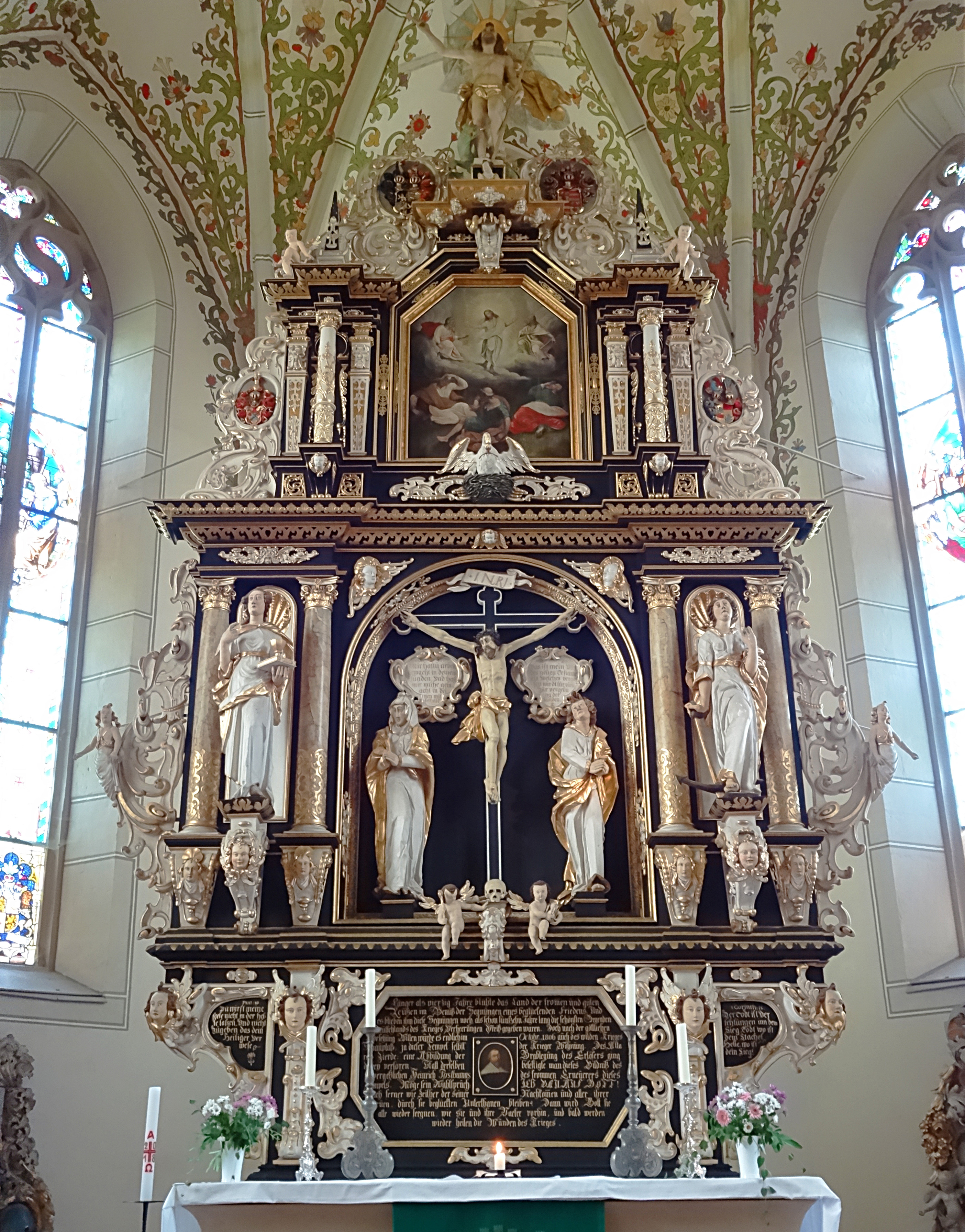 Altar von 1635 in der Bergkirche Sankt Marien, Schleiz